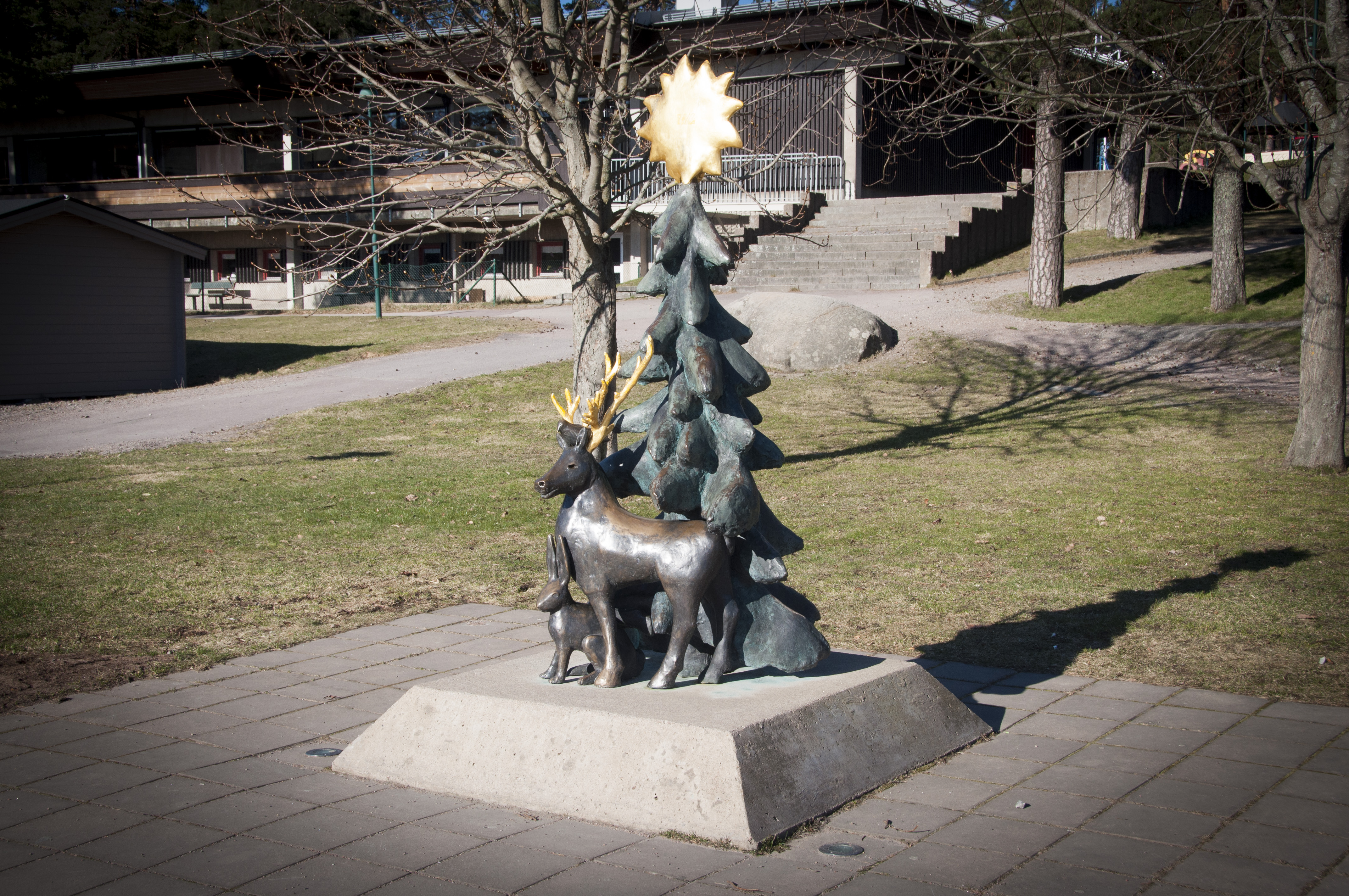 Under solen, Patinerad brons, Klara Kristalova.2006, Mariebergsskogen i Karlstad